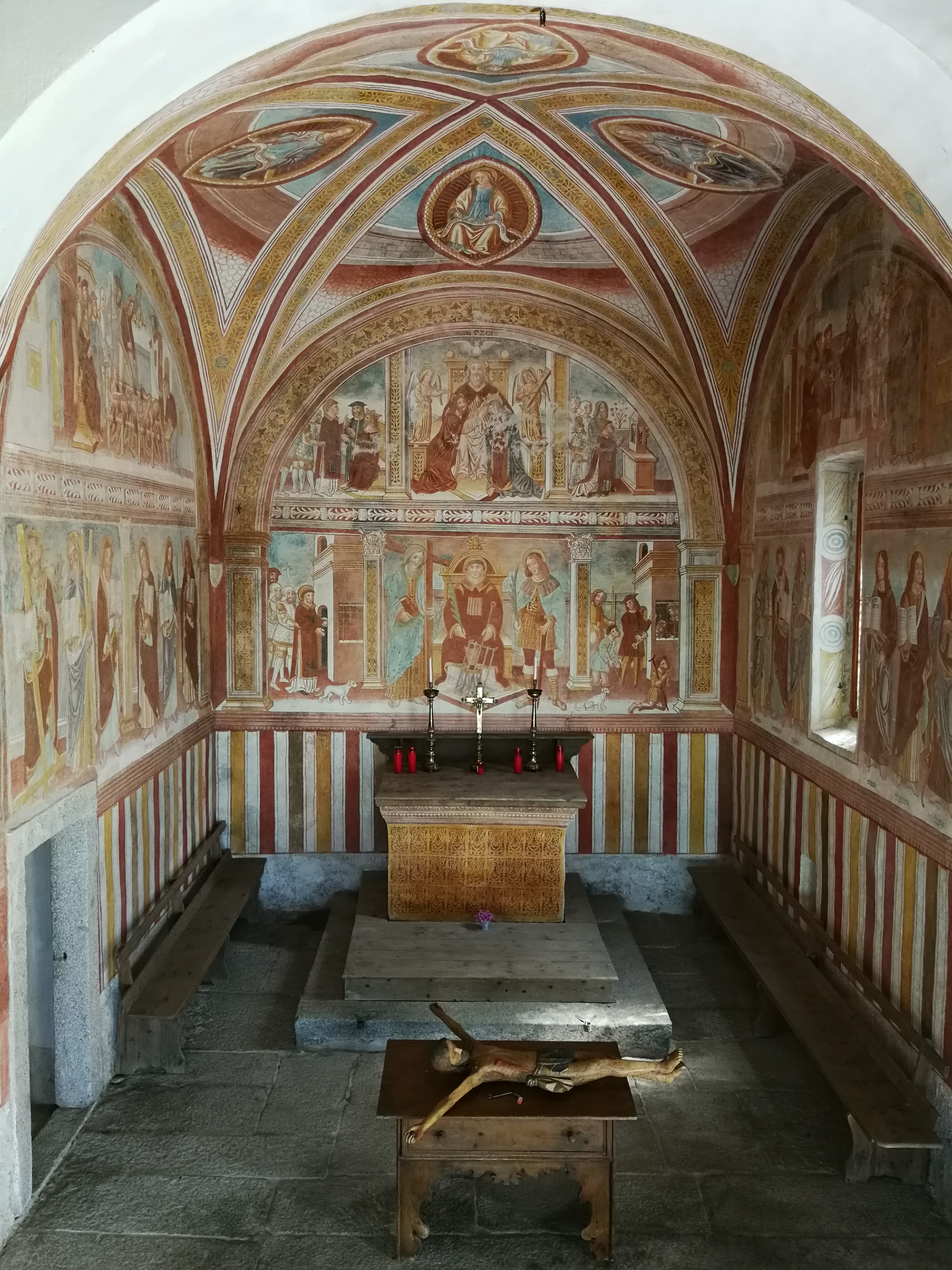 interno della chiesa di San Lorenzo di Storo This is a photo of a monument which is part of cultural heritage of Italy.